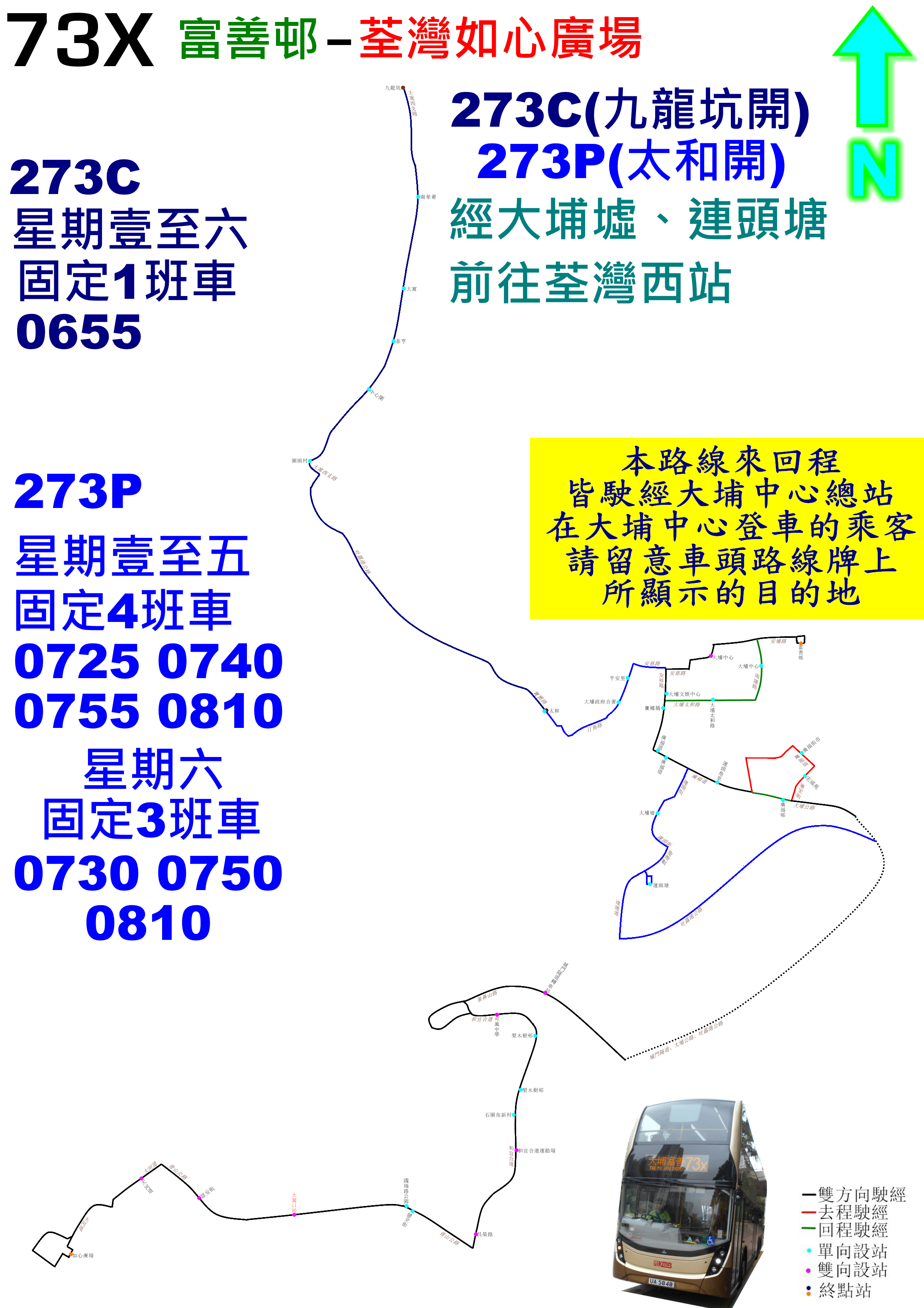 中文（香港）: 九巴73X線的走線圖